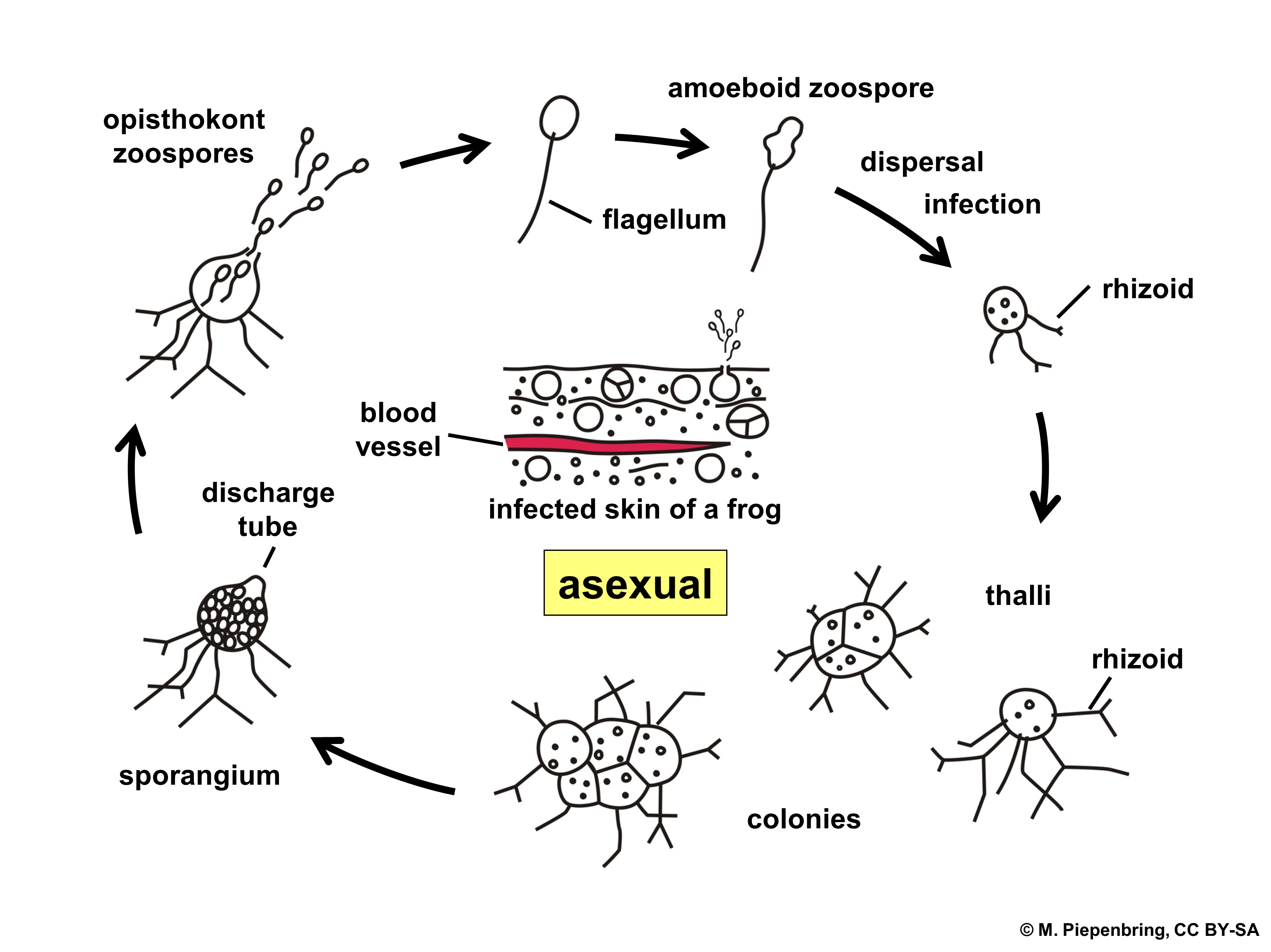 Biologische Schemata, gezeichnet und freigegeben von M. Piepenbring